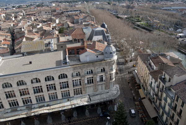 Panorámica de Narbona desde la torre Donjon Gilles Aycelin en el ayuntamiento